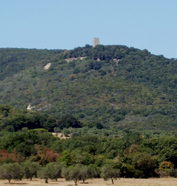 La Torre della Bella Marsilia a Collecchio nel comune di Magliano in Toscana